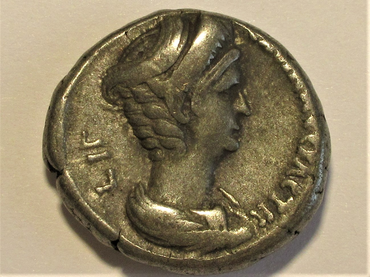 Sabina auf Alexandrinischer Tetradrachme, Kampmann/Ganschow 32.469